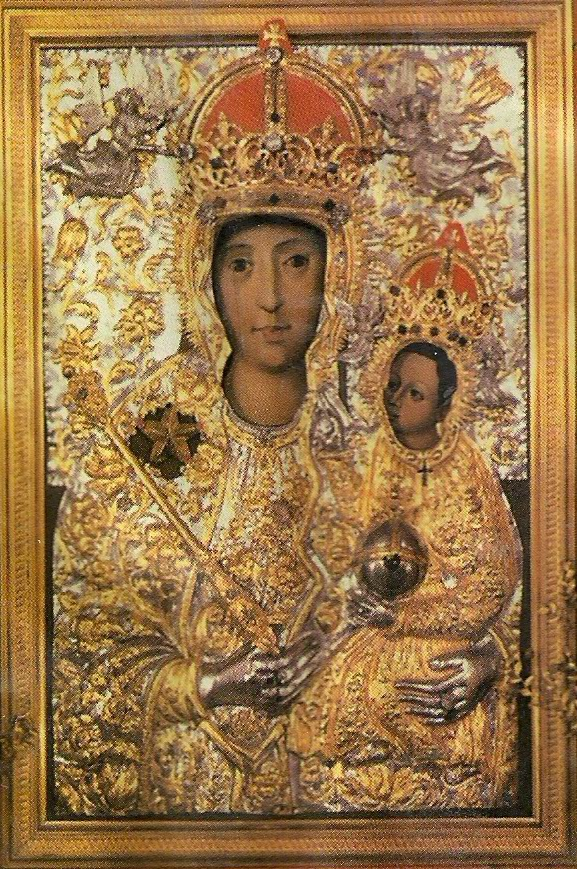 MB Zwycięska z Brdowa